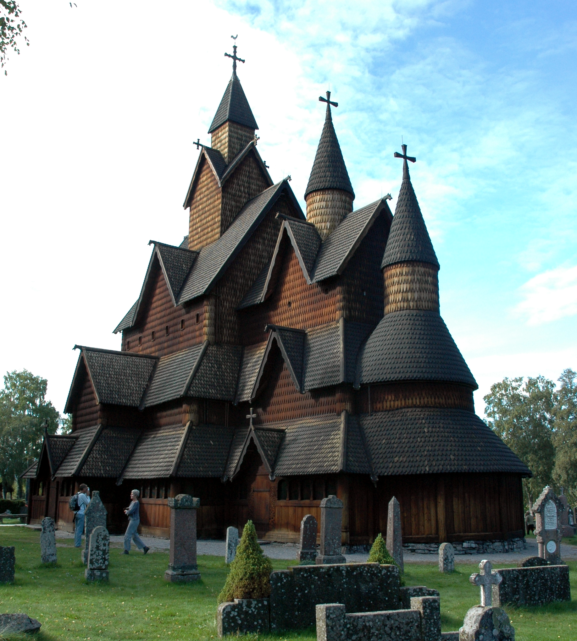 The stave church in Heddal, Norway. It is from 1147 and is Norway's largest. My own photo, by Kjetil Lenes.